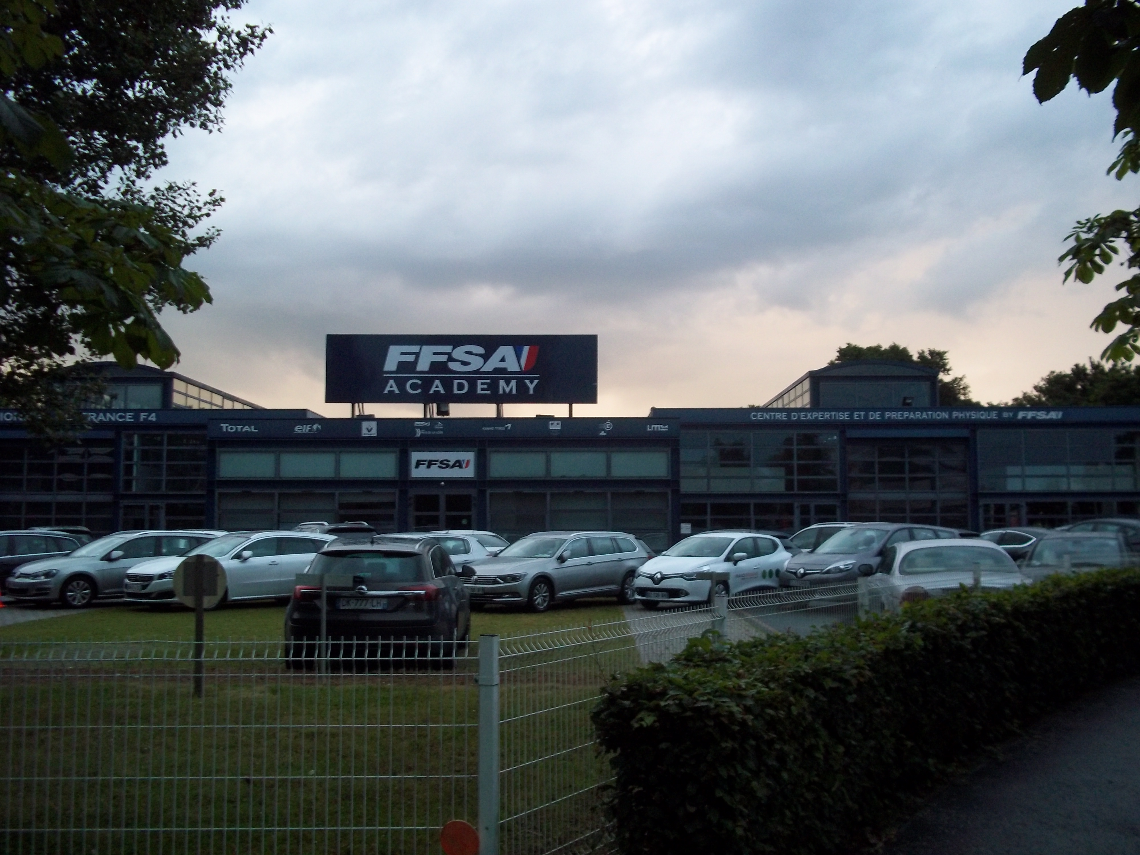 FFSA Academy - Technoparc des 24h - Le Mans